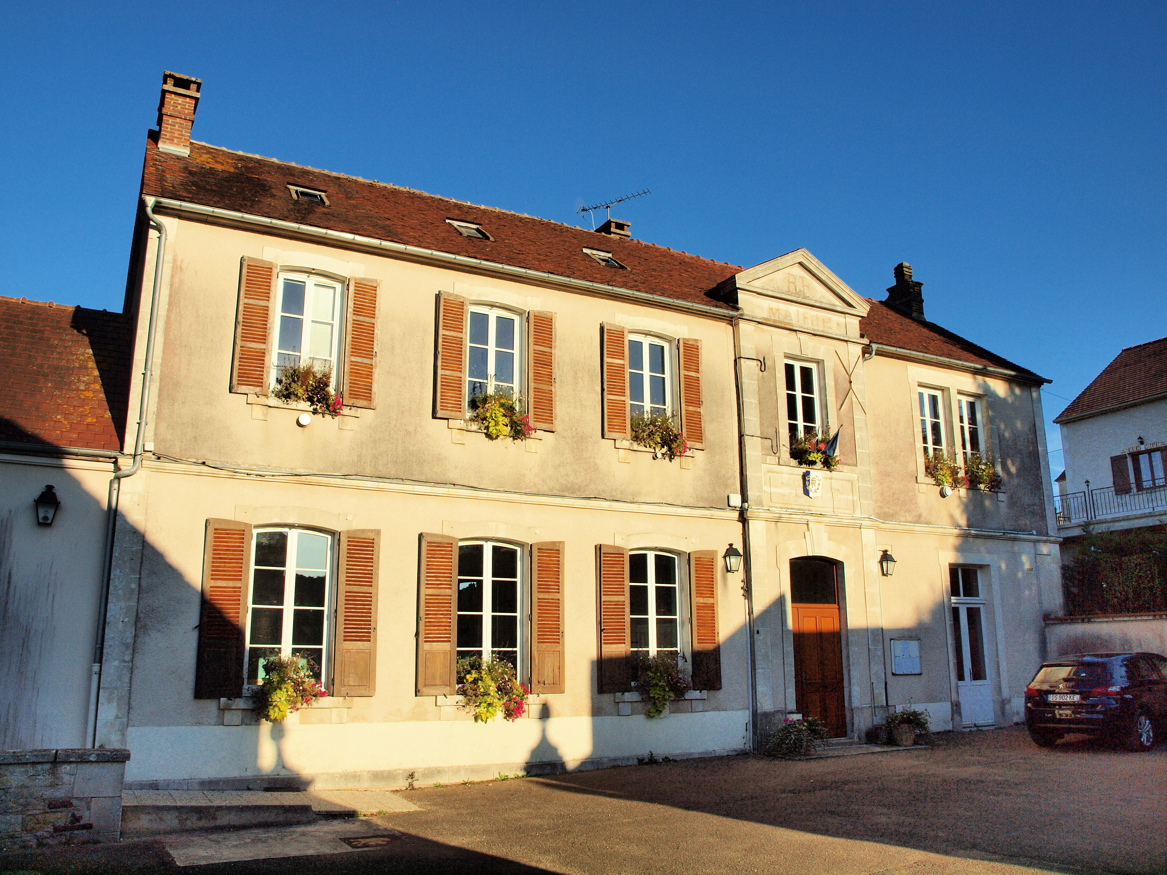 Coulangeron (Yonne, France)